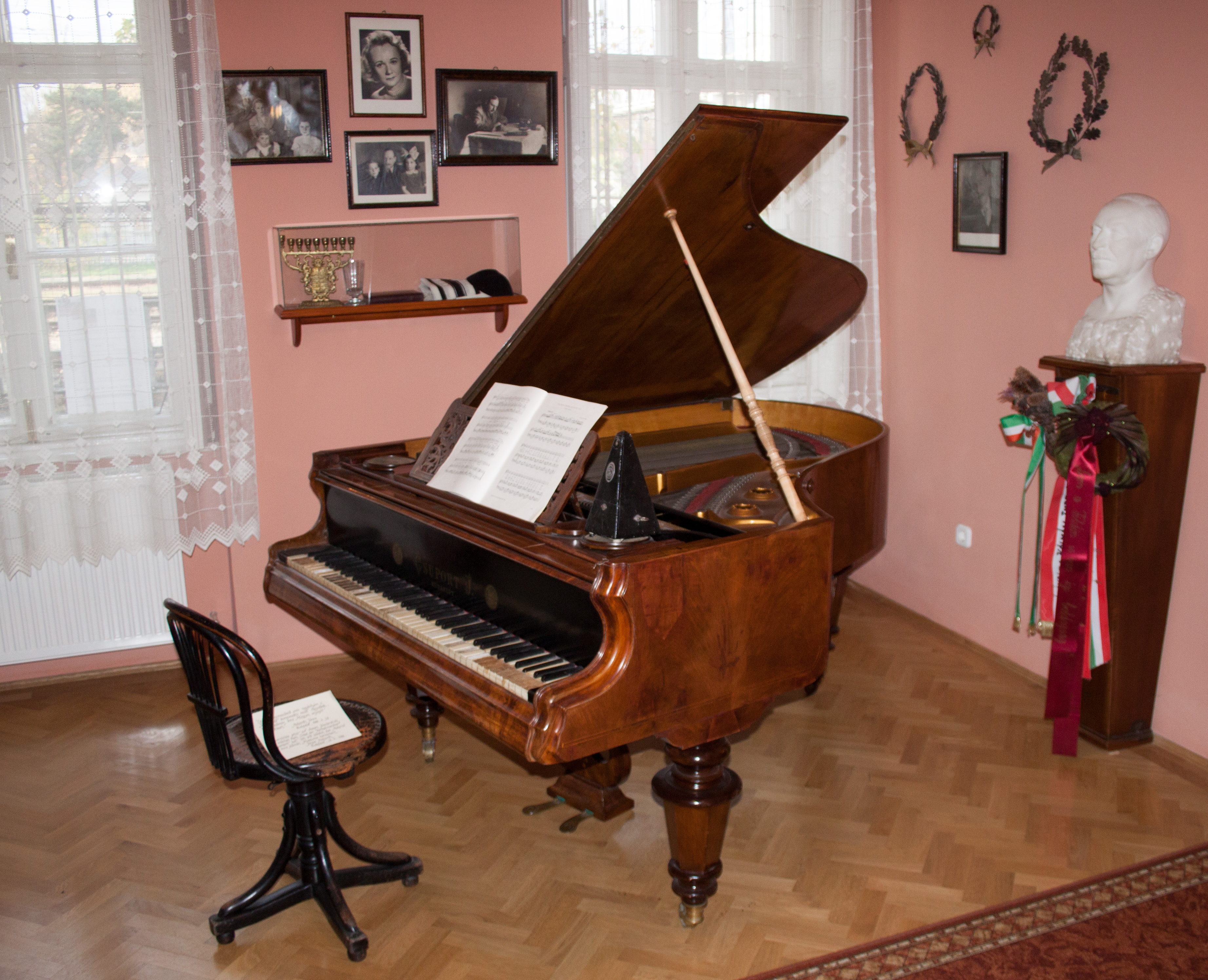 Piano_of_Imre_Kálmán_in_his_museumlabel QS:Len,"Piano_of_Imre_Kálmán_in_his_museum"label QS:Lhu,"Kálmán Imre zongorája"